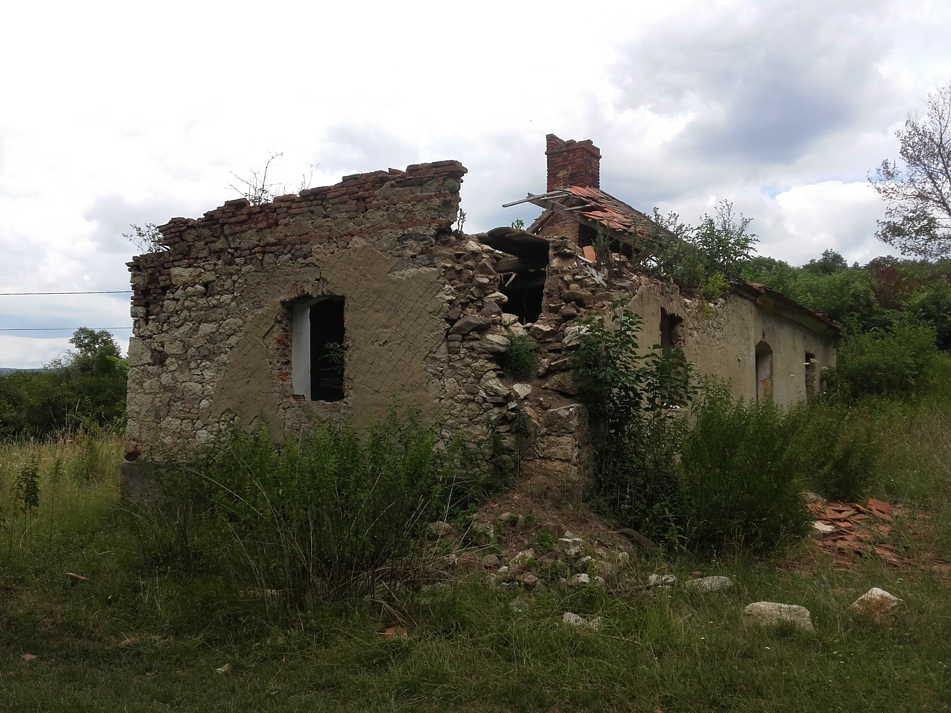 A cekeházi Patay-kastélyhoz tartozó egykori majorsági épület romja